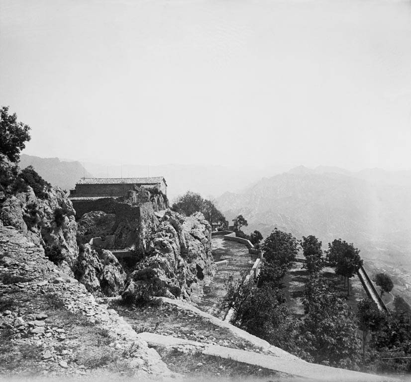 El santuari de Queralt. Cèsar August Torras i Ferreri (ca. 1905)